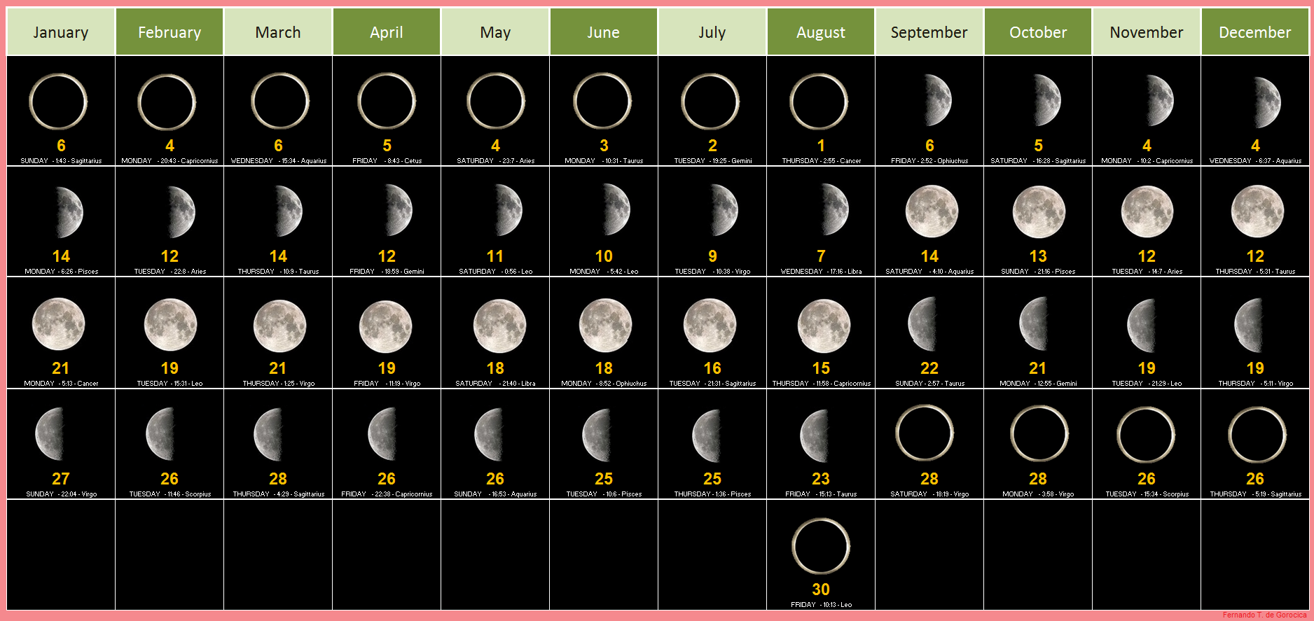 2019 ANUAL LUNAR CALENDAR. The 4 lunar phases for the year 2019 and for the northern observers. For each phase: day number of the month, day of the week, phase hour (U.T.) and the constellation where is located the moon at that time.